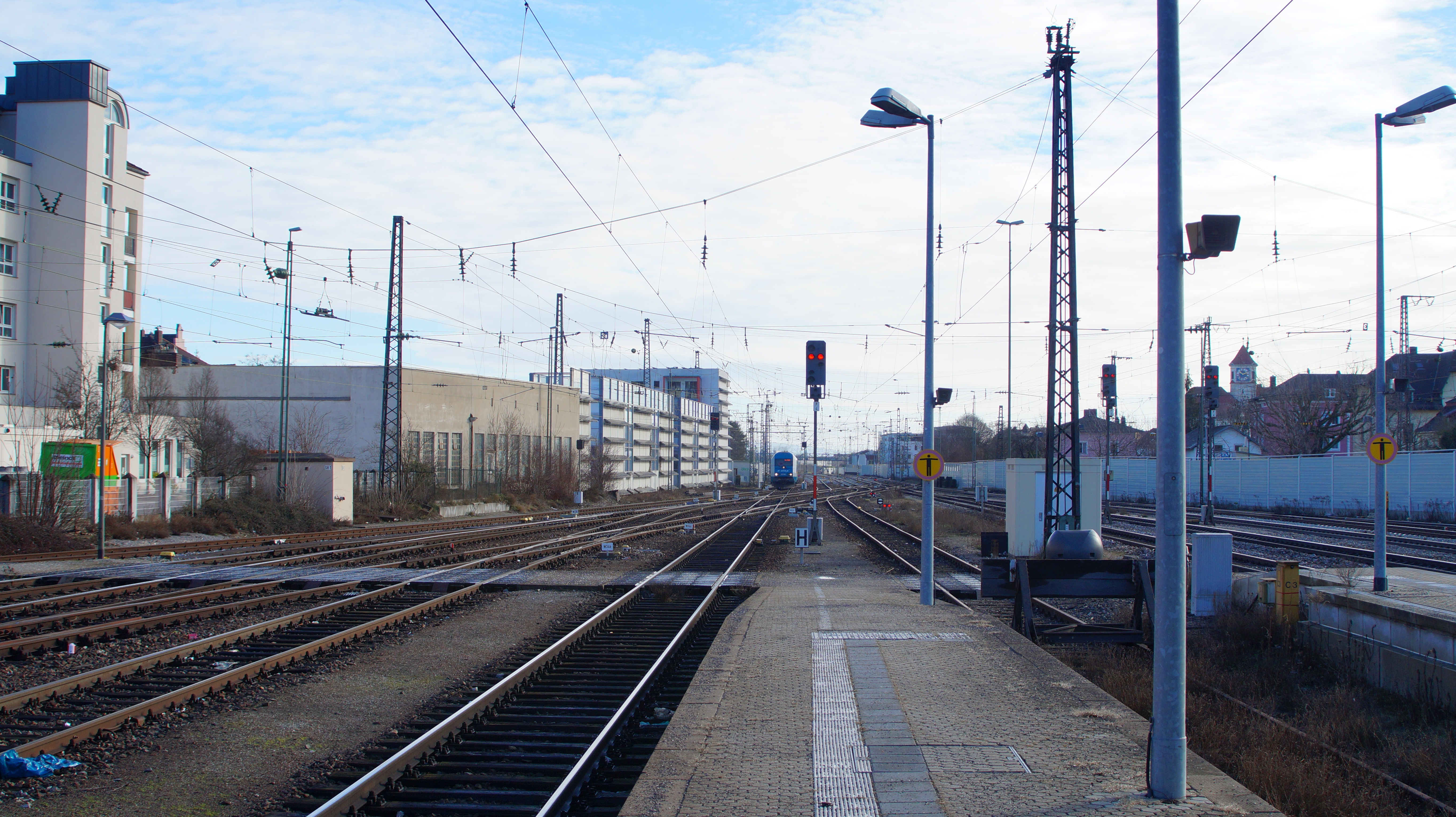 Regensburg